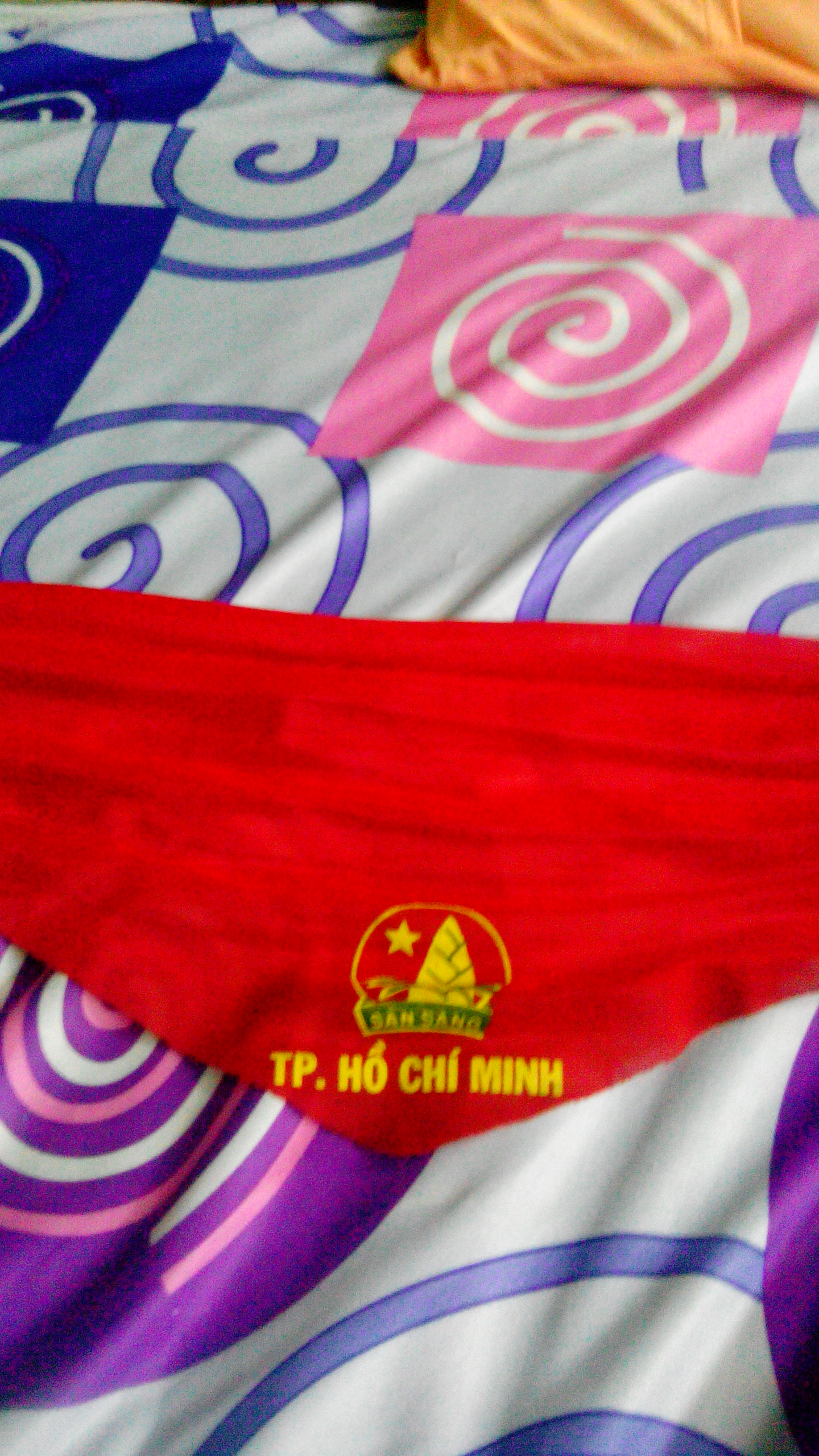 Khăn quàng đỏ